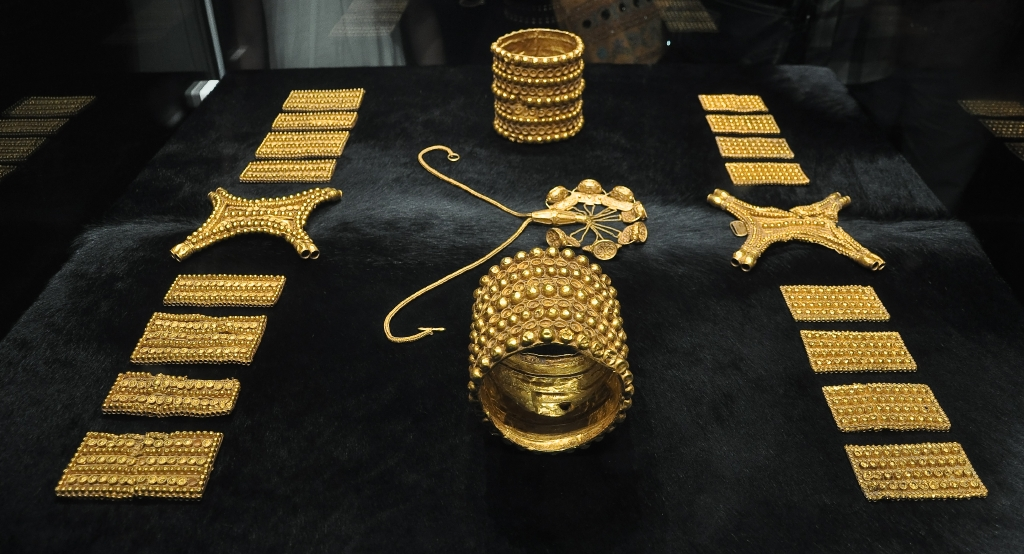 Réplica del tesoro del Carambolo en el Museo Arqueológico de Sevilla, (España).